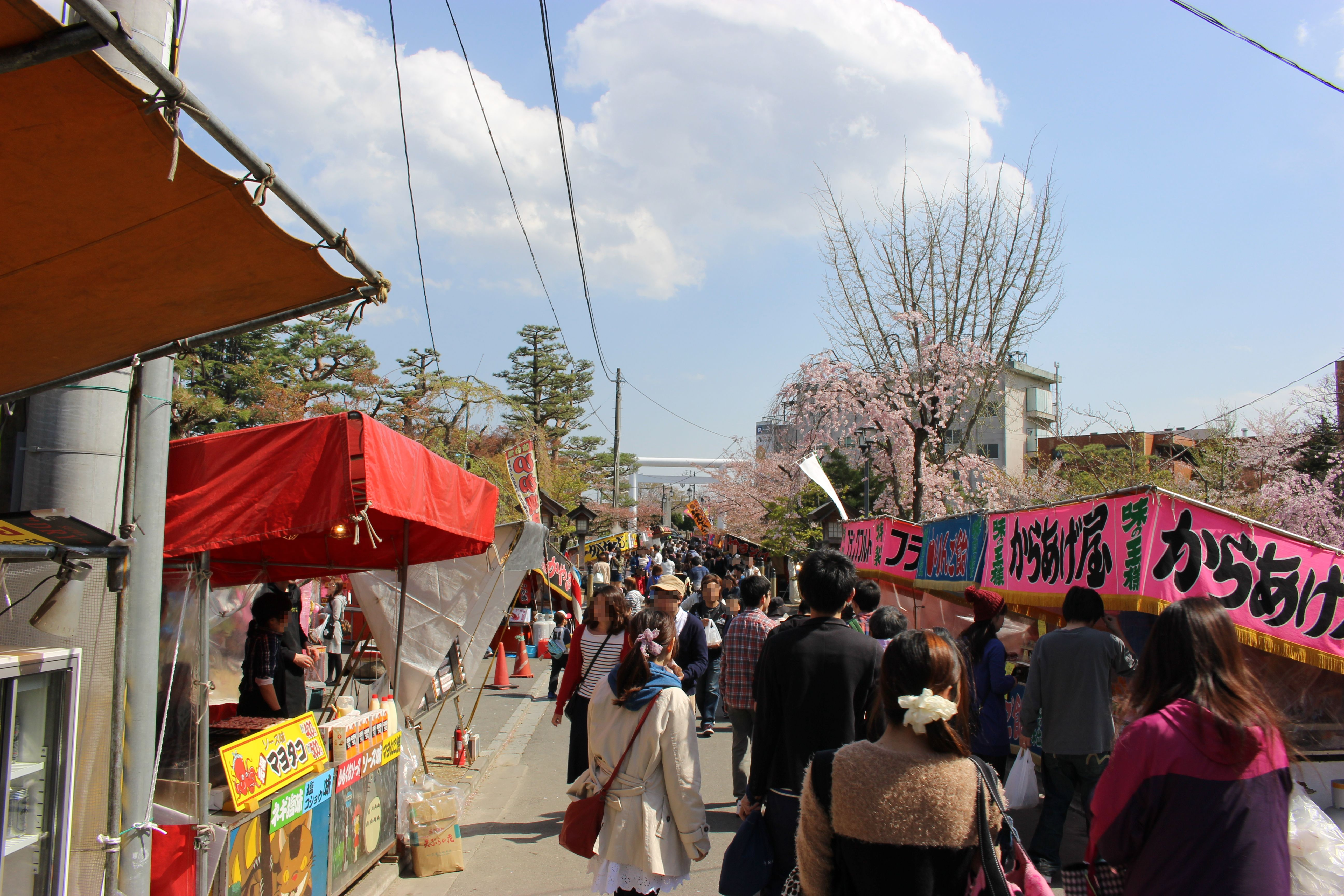 開成山大神宮境内で行われている桜まつりの様子